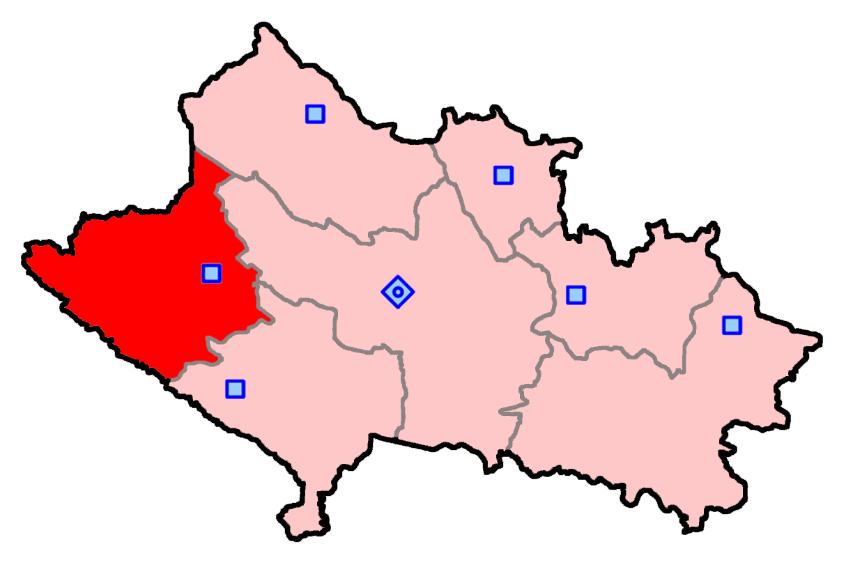 حوزه‌ کوهدشت برای انتخابات مجلس شورای اسلامی